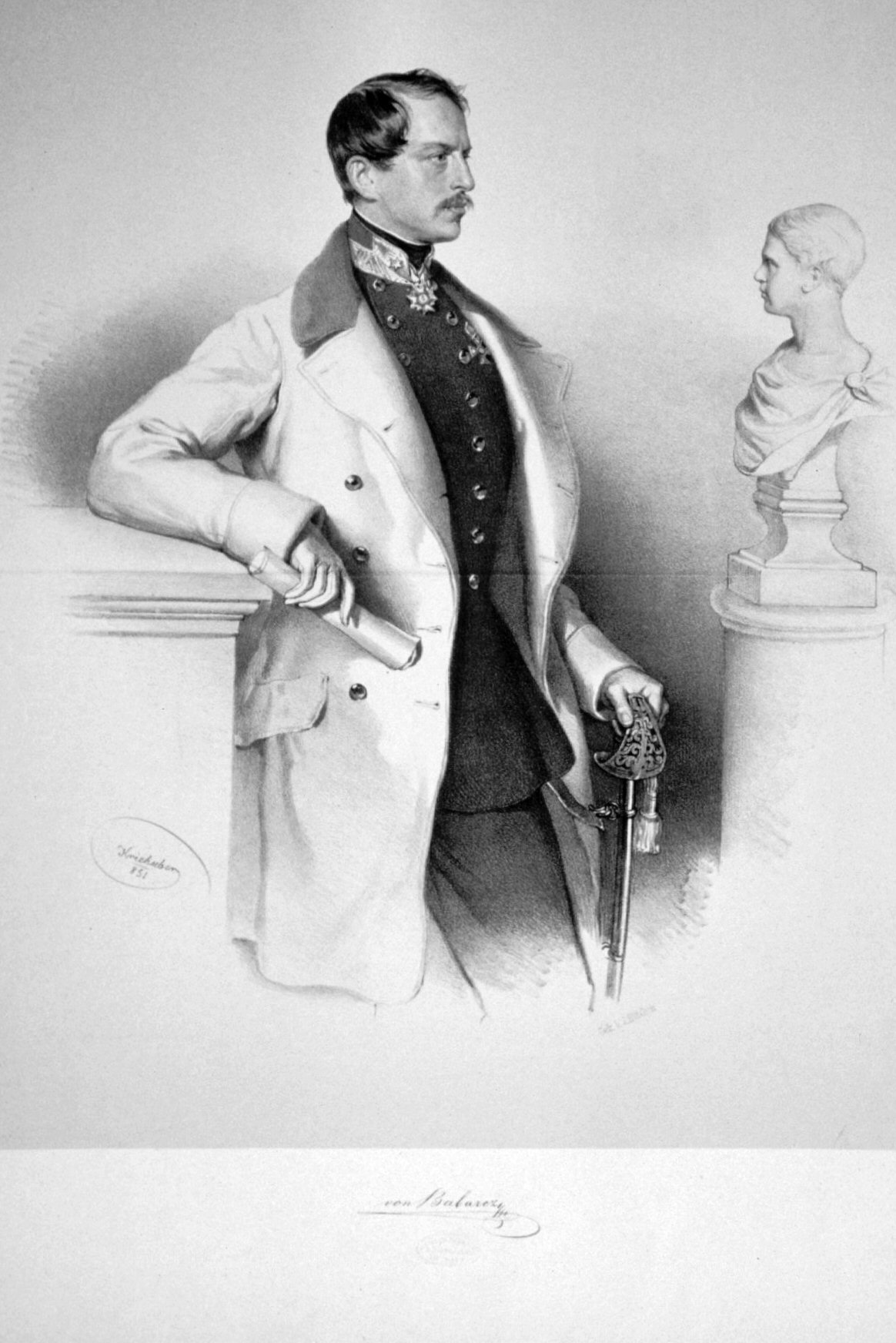 Emmerich Freiherr von Babarczy (1818-1881), k. k. Feldmarschallleutnant, Lithographie von Josef Kriehuber, 1851